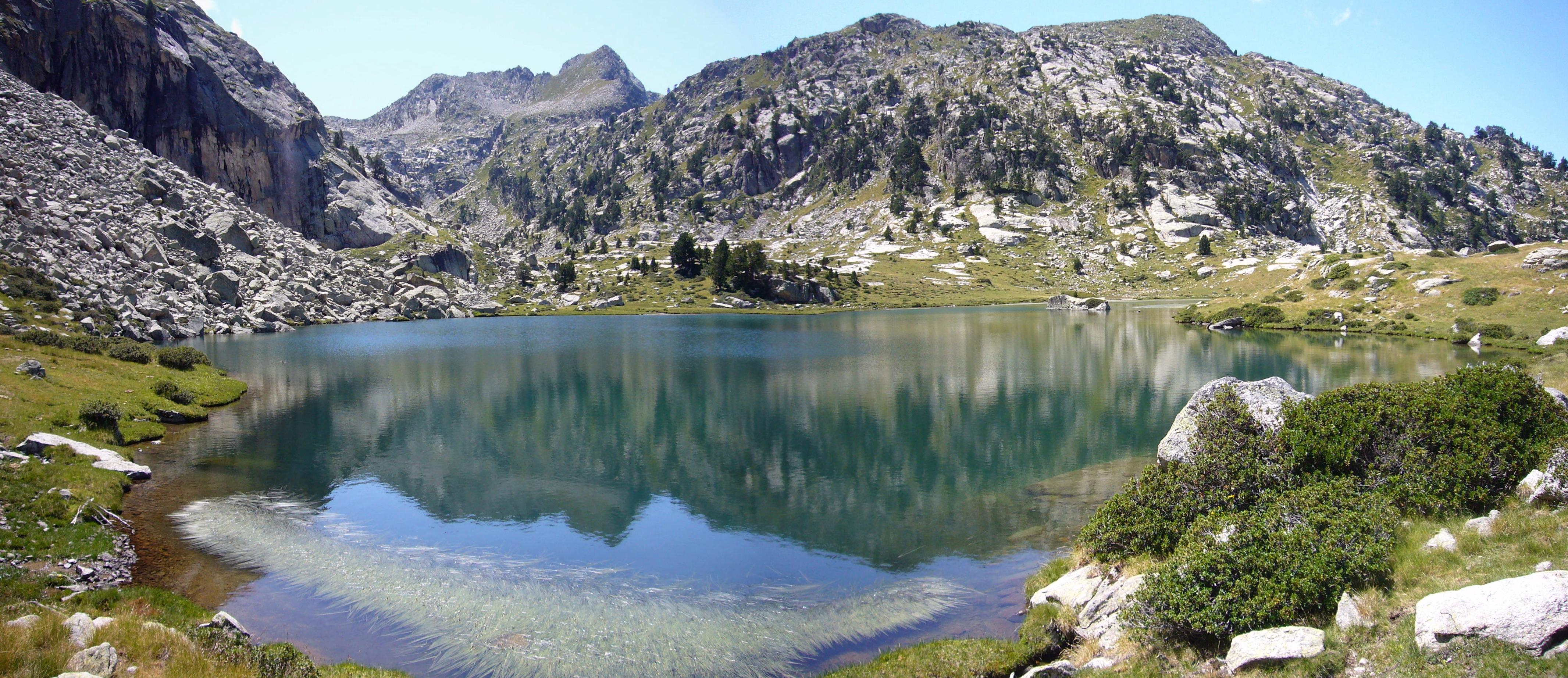 Estany de la Coma d'Amitges; la Vall de Boí, Alta Ribagorça, Catalunya